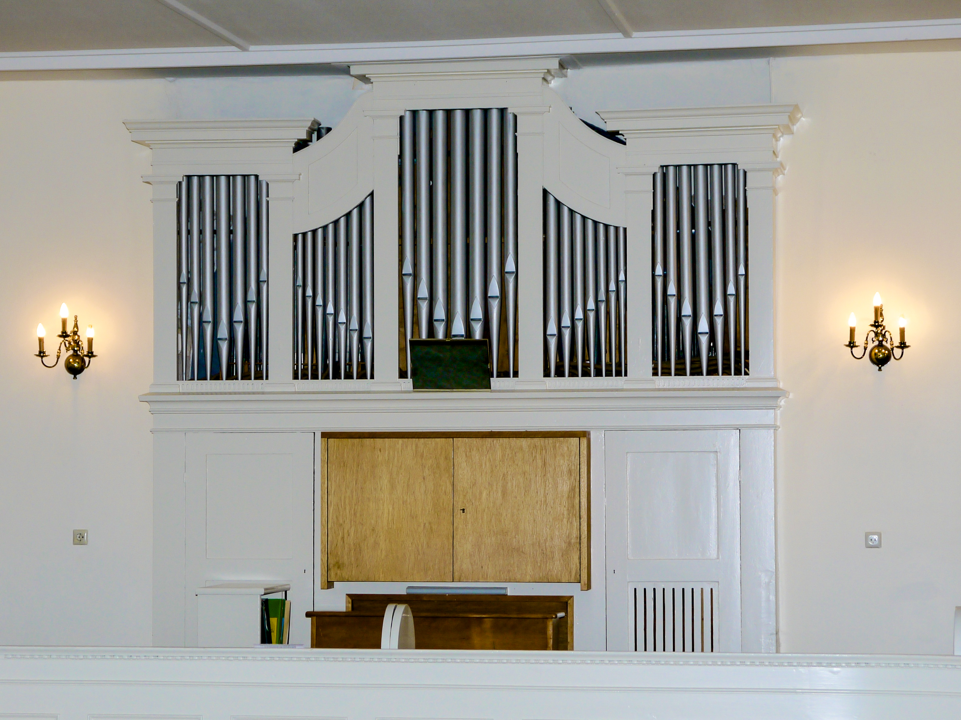 Christuskirche von Salzgitter-Gitter: Orgel der Christuskirche